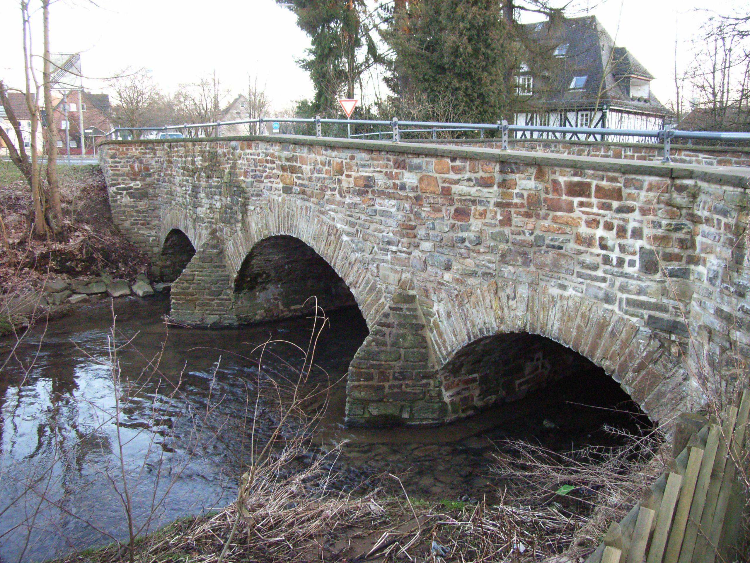 Alte Steinbruecke ueber die Littfe im alten Ortskern von Kreuztal-Eichen